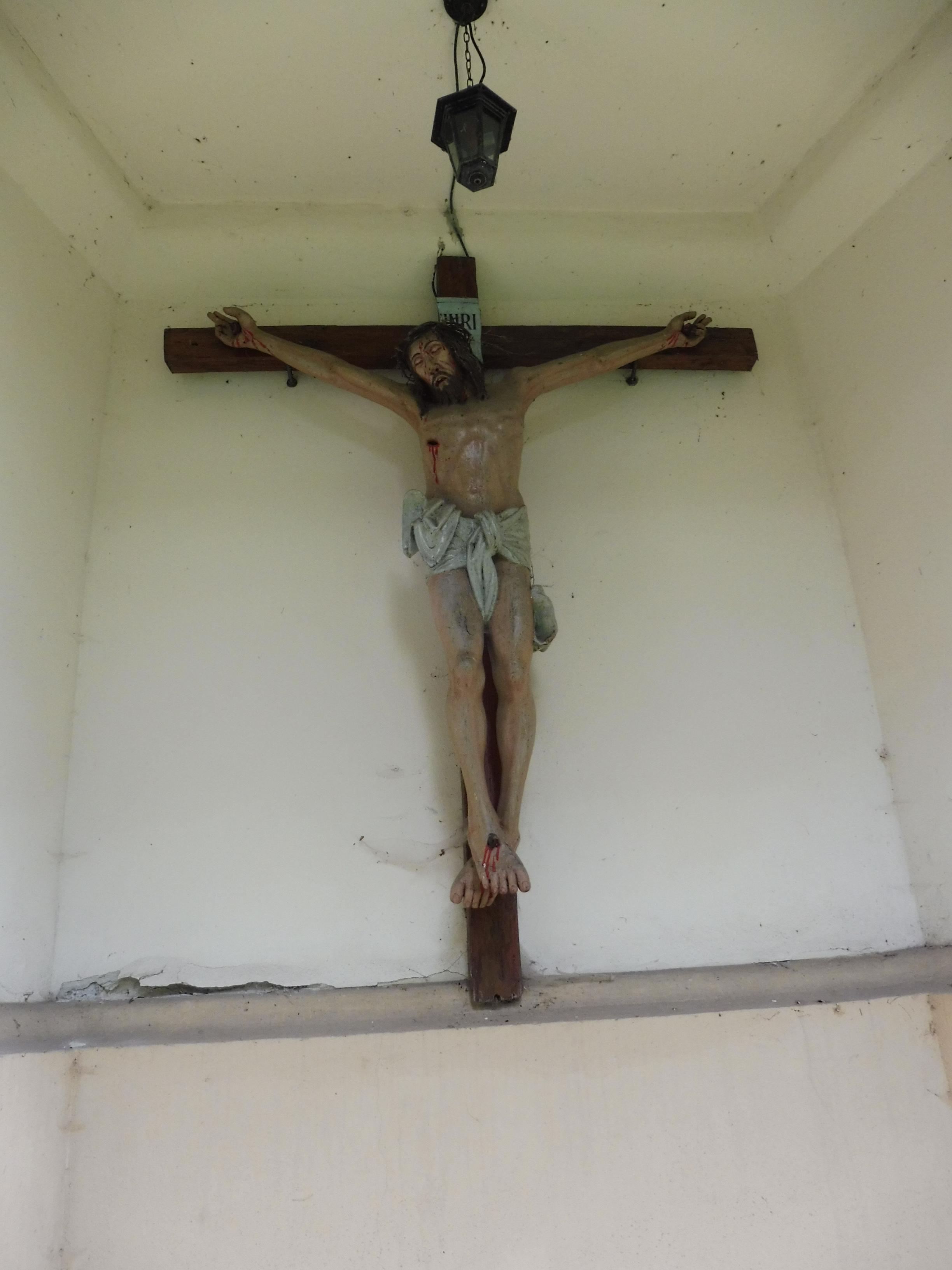 Witów - rzymskokatolicki kościół parafialny p.w. Świętej Trójcy